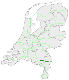 E34 in Nederland, zelf gemaakt